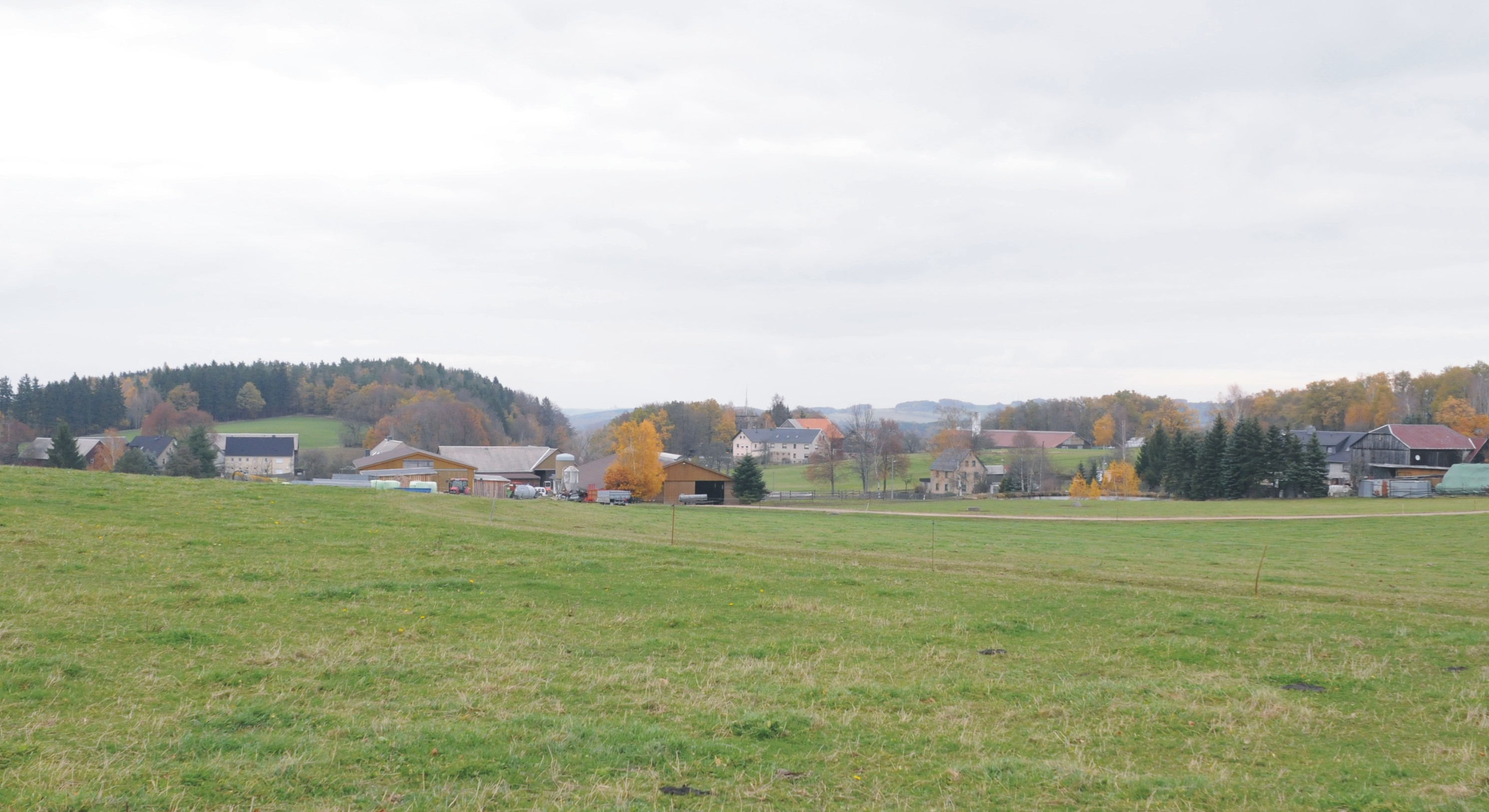 Giegengrün, Gemeinde Hartmannsdorf bei Kirchberg (Sachsen, Deutschland)